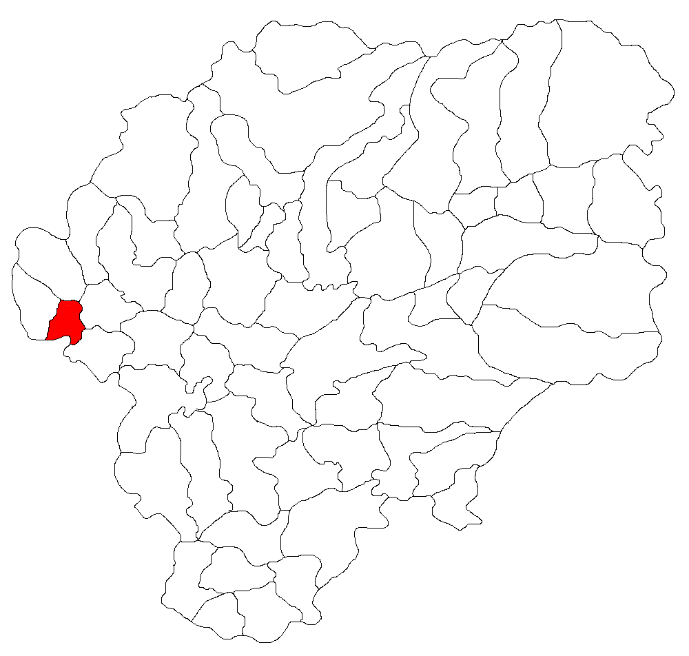 Categorie:Hărţi ale judeţului Bistriţa-Năsăud